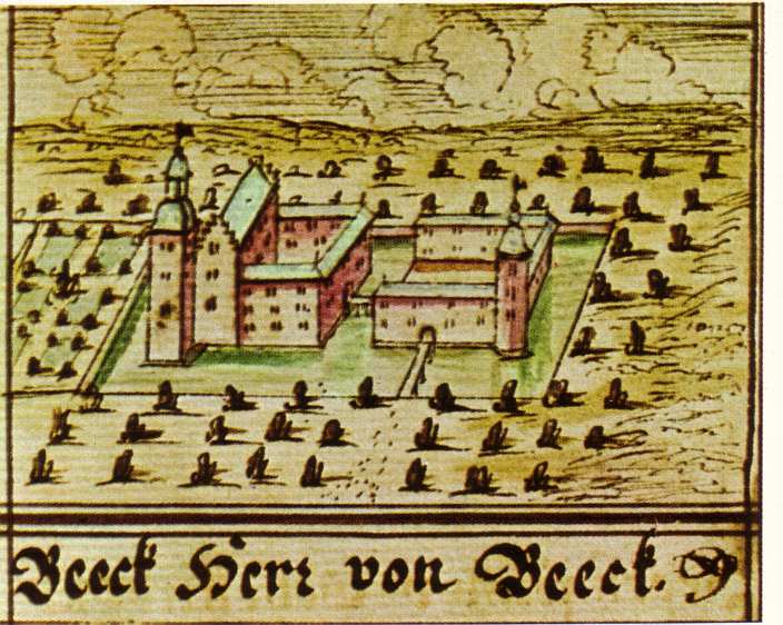 Haus Beeck (Wegberg), Codex Welser